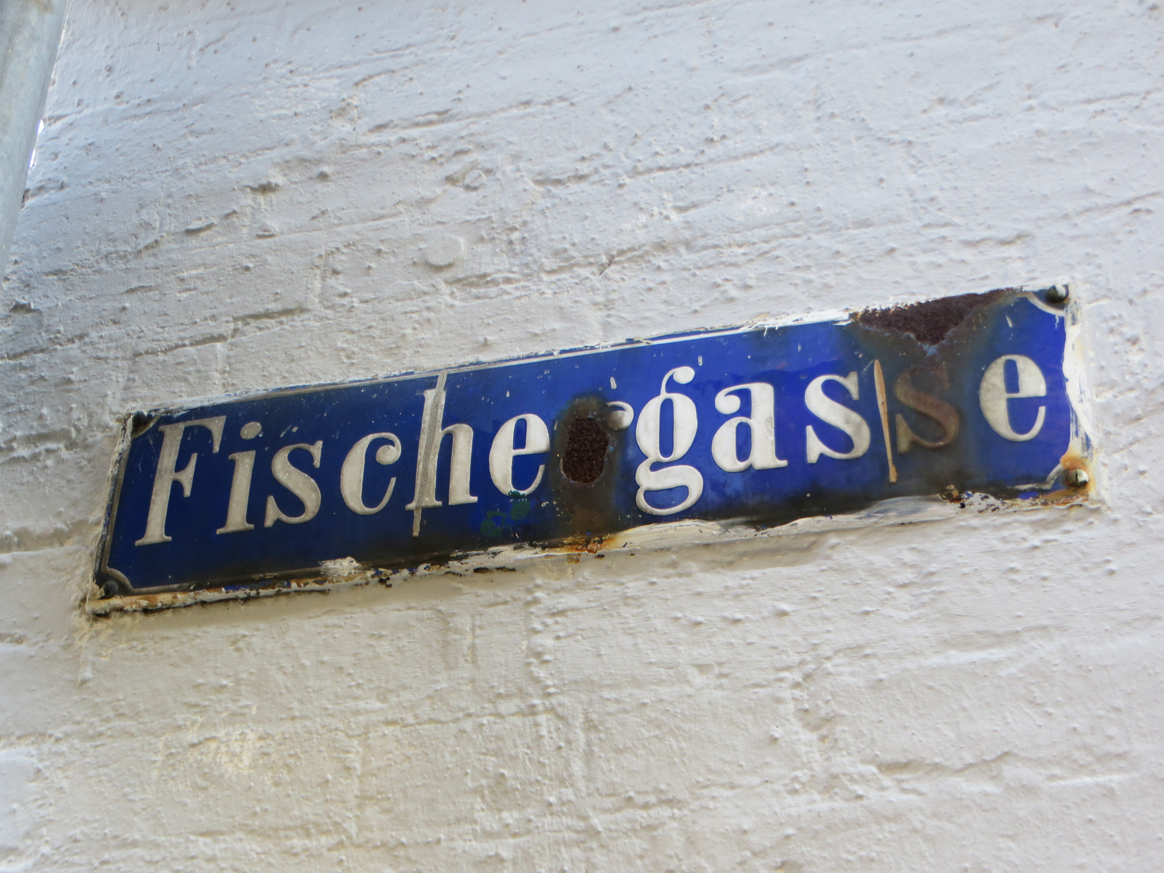 Straßenschild Fischergasse (Flensburg), Bild 003